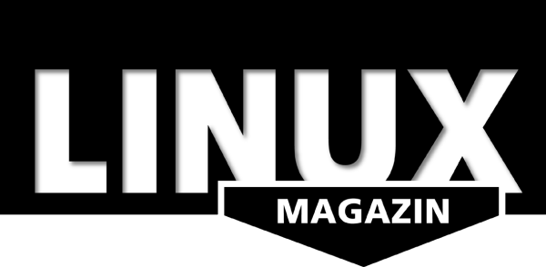 Logo des Linux-Magazins